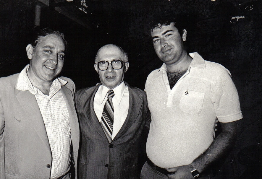 אריה בראון יחד עם מנחם בגין וחומי בראון באירוע פרטי בביתו של מנחם בגין, דאז ראש הממשלה.